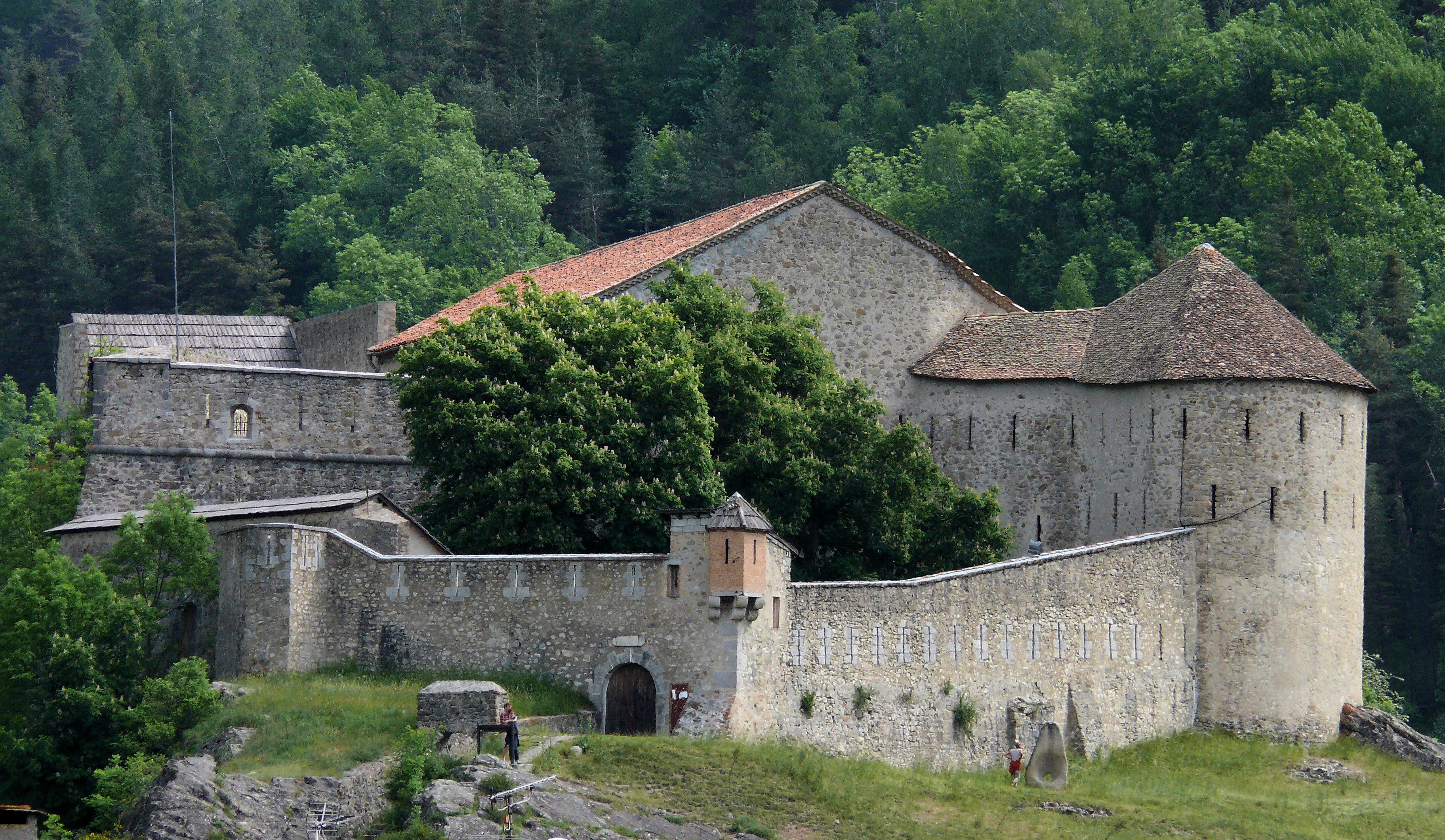 Colmars - Fort de Savoie vu du fort de France